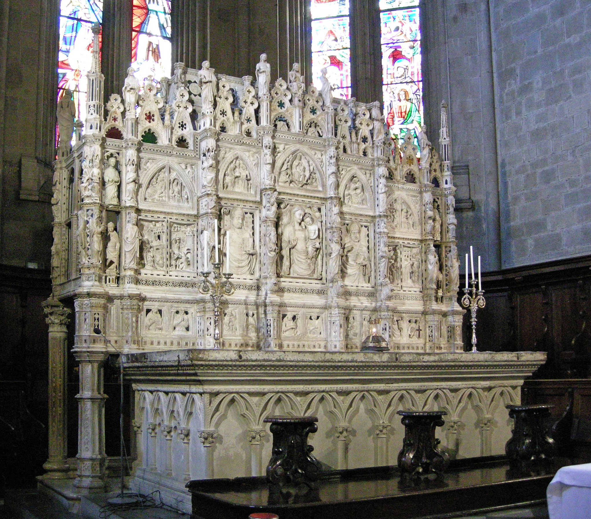 Duomo di arezzo, interno, altare marmoreo